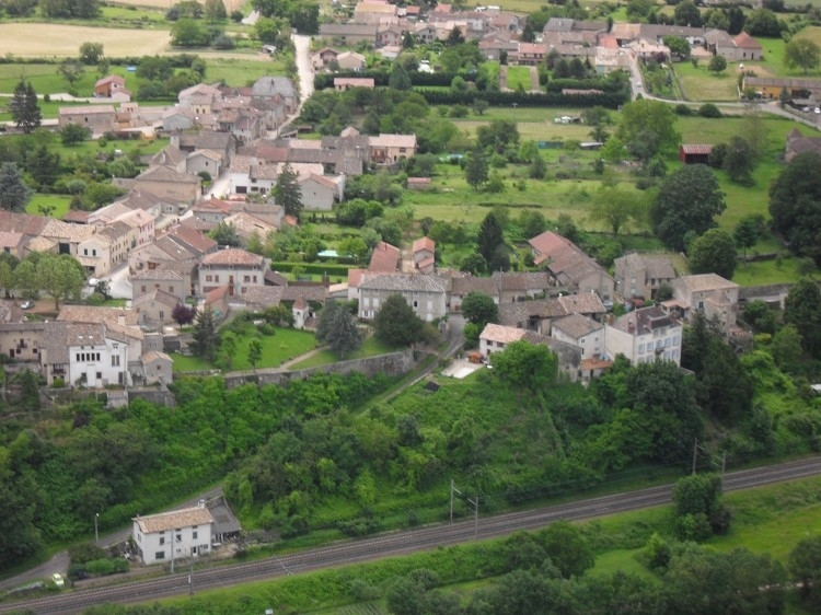 Vue d'ulm